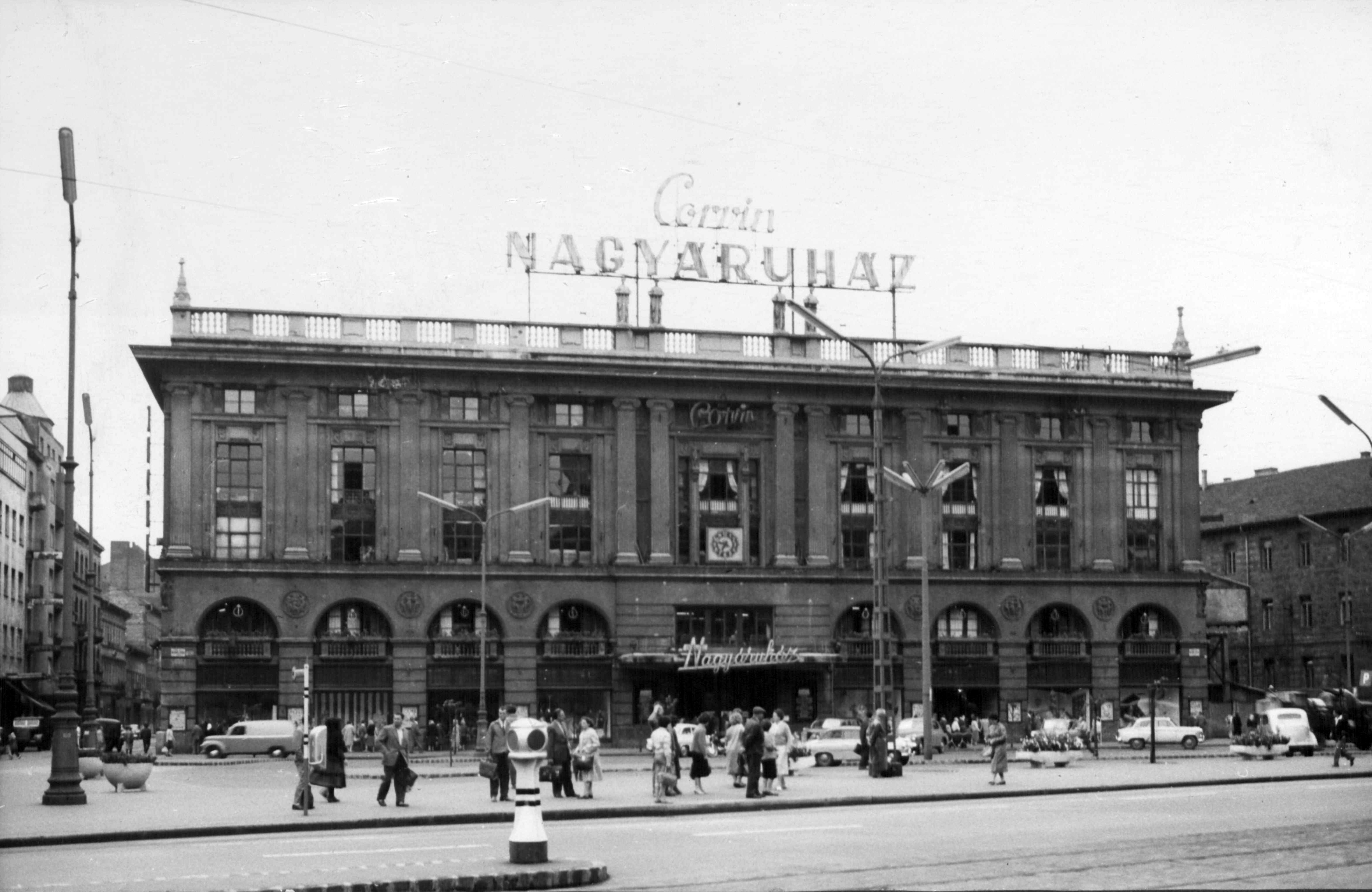 A kép forrását kérjük így adja meg: Fortepan / Budapest Főváros Levéltára. Levéltári jelzet: HU_BFL_XV_19_c_11 Location: Hungary Tags: Budapest, Corvin Store Title: A kép forrását kérjük így adja meg: Fortepan / Budapest Főváros Levéltára. Levéltári jelzet: HU_BFL_XV_19_c_11